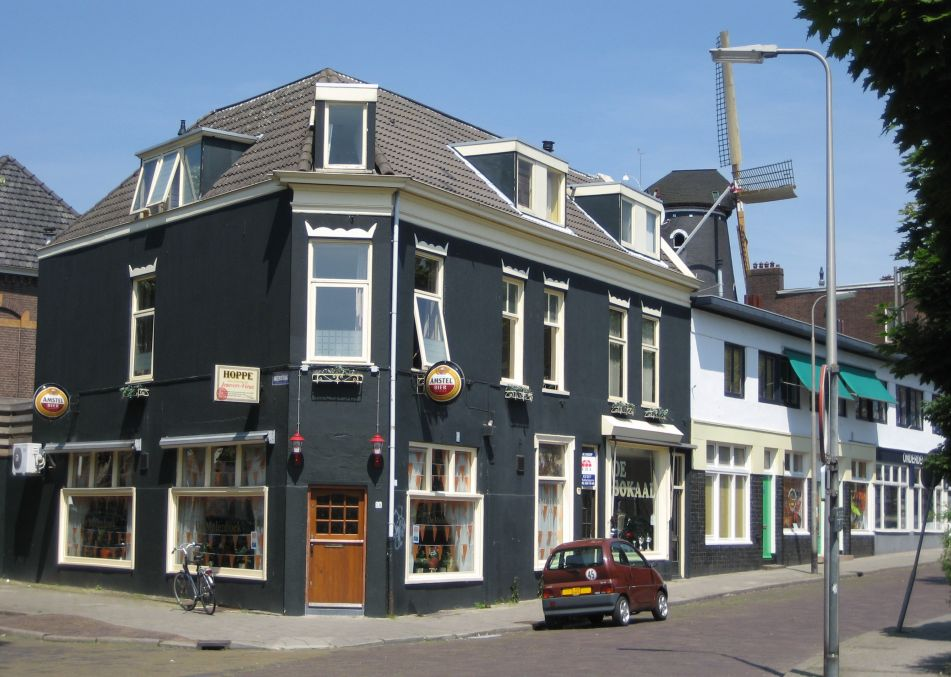 Hartje Klarendal met op de achtergrond de molen. Café Hoppe, Akkerstraat 2-4